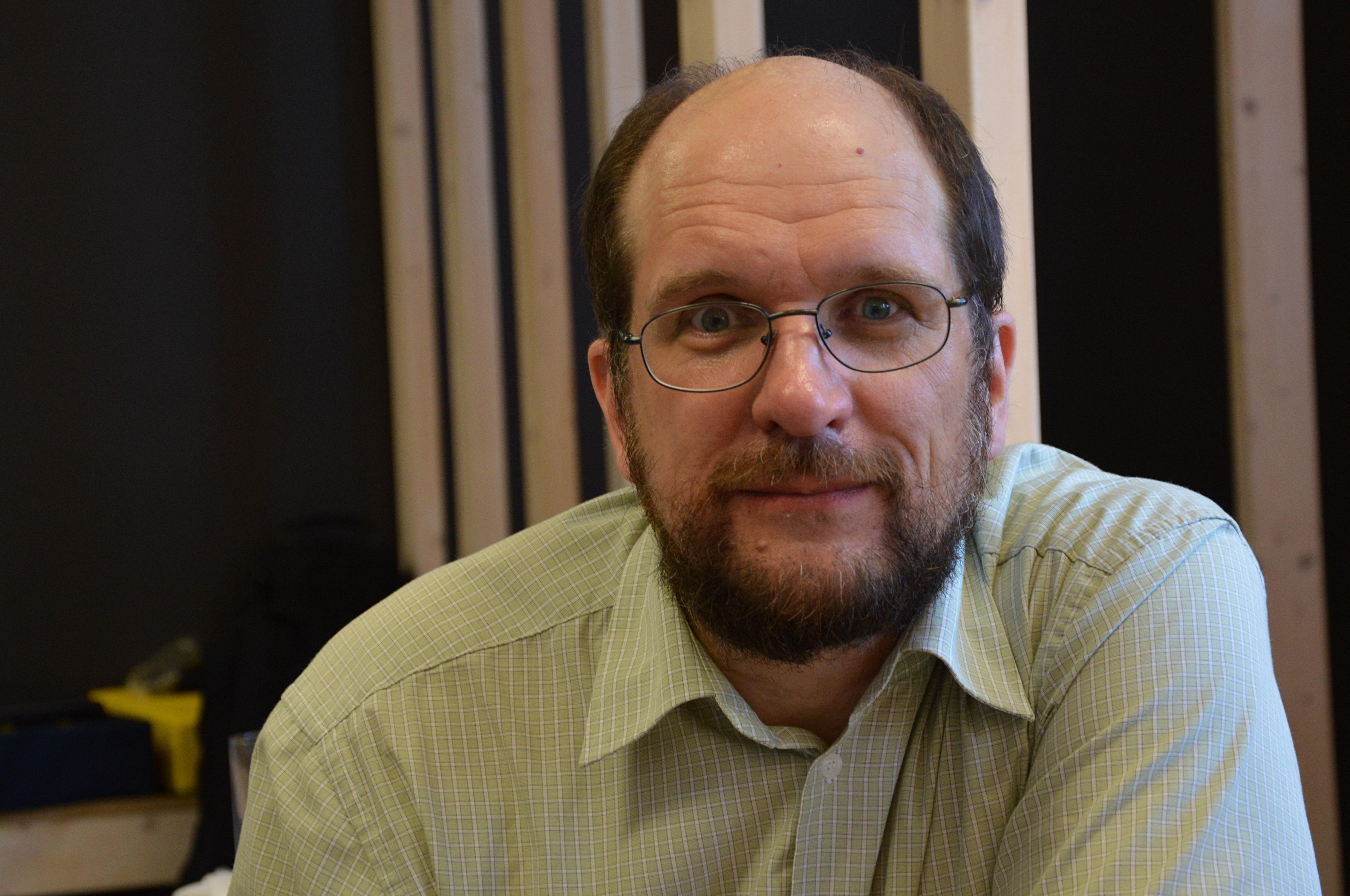 Eero Uustalu